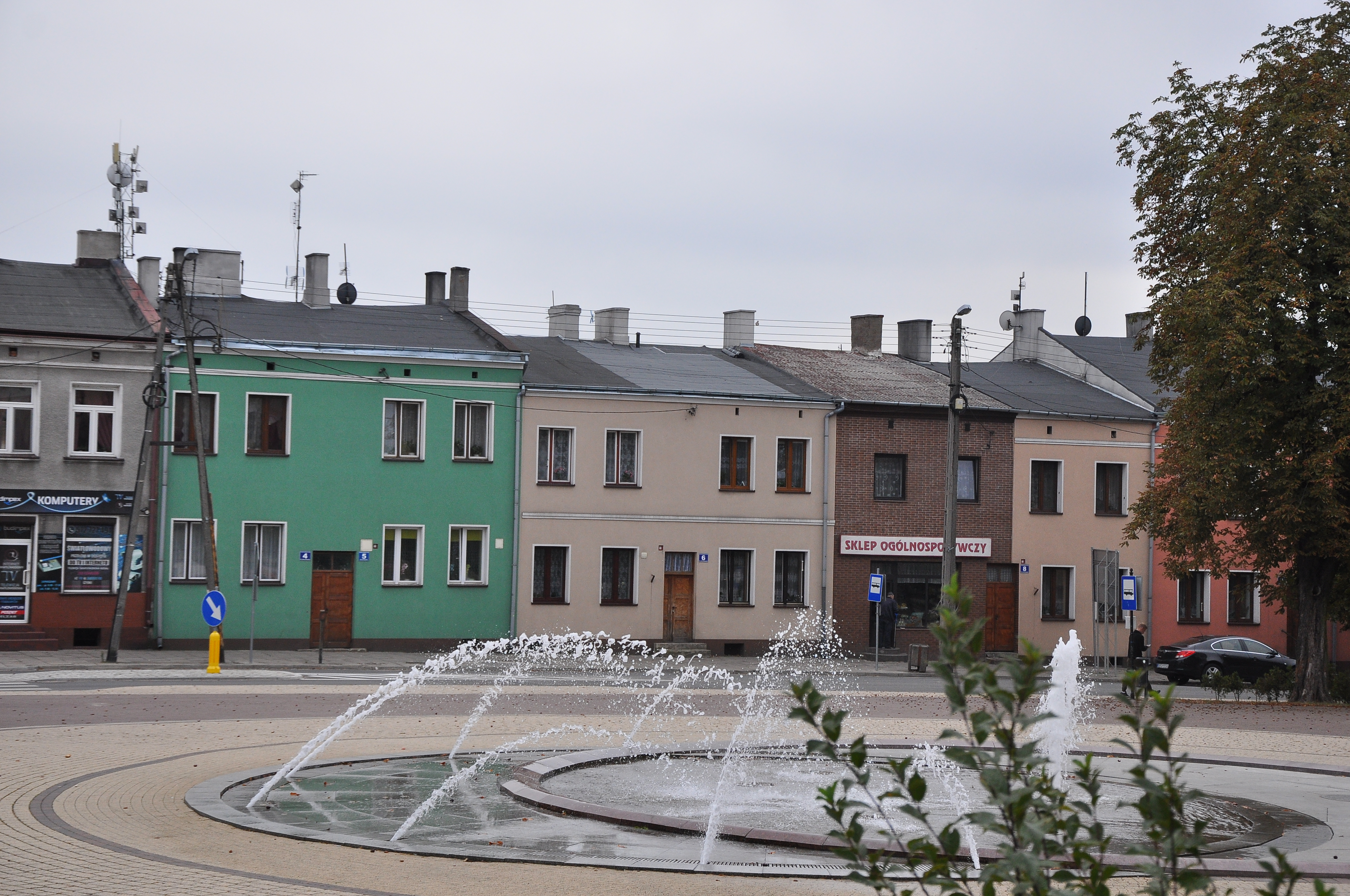 Kamieniczki w centrum miasta. XIX wieczna zabudowa śródmiejska.